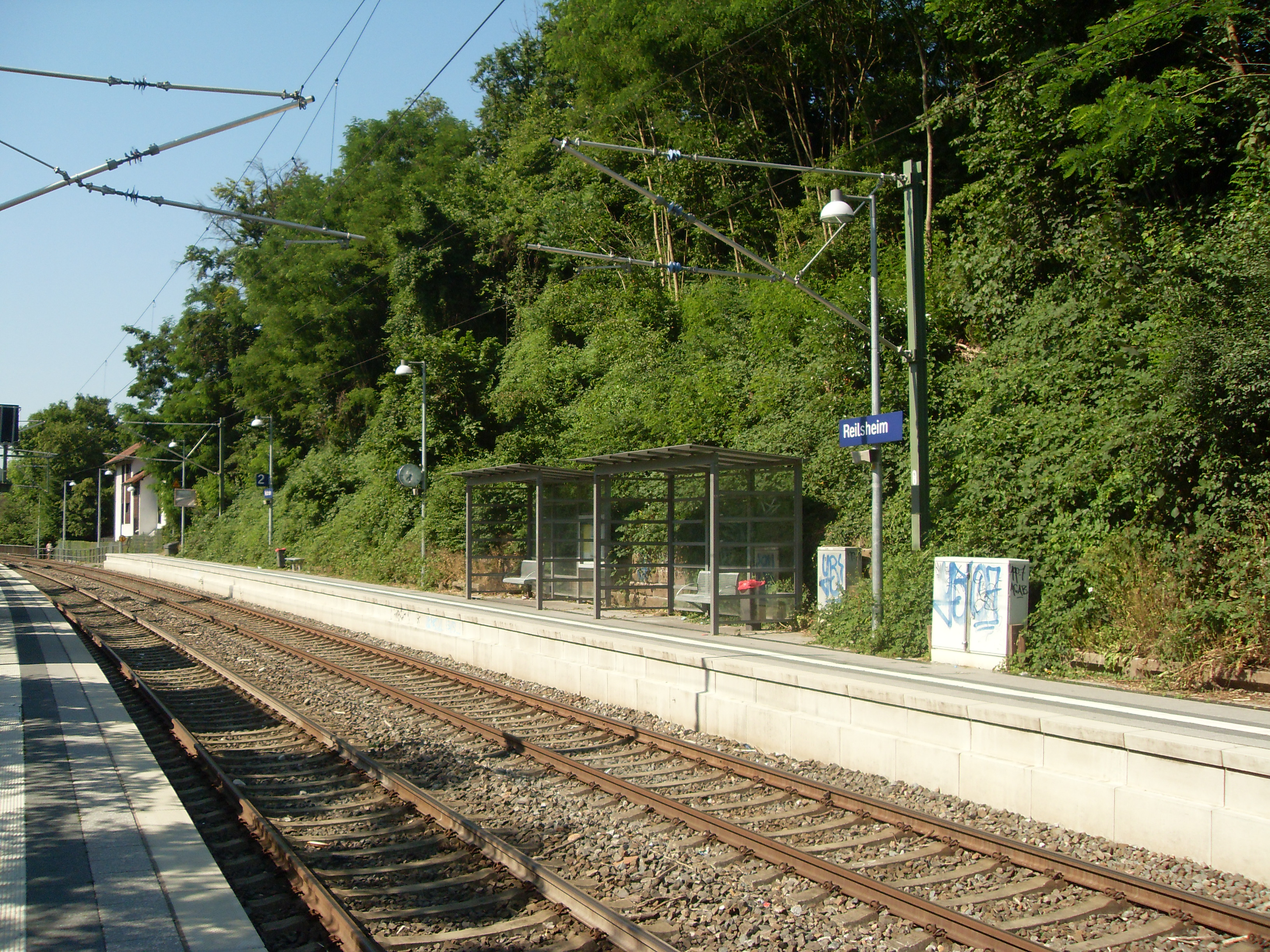 Przystanek osobowy Reilsheim w Bammental